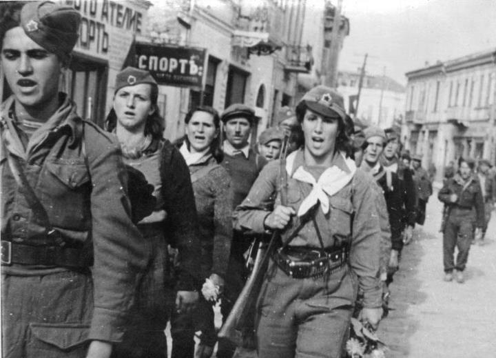 Првата егејска ударна бригада впо Битола, 1944 г.